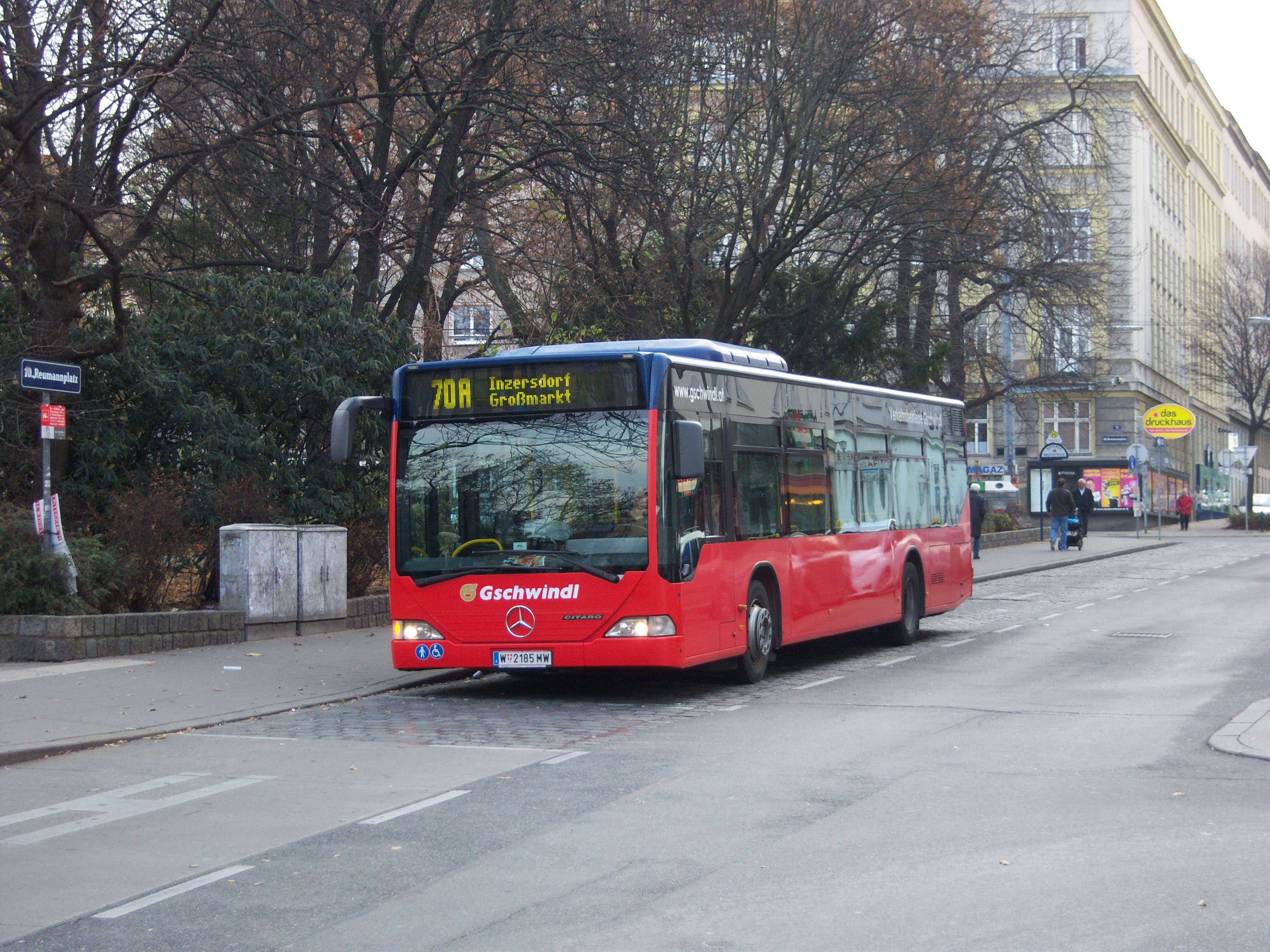 Ein Mercedes-Benz Citaro-Bus bei der U-Bahn-Station Reumannplatz, eingesetzt auf der Linie 70A